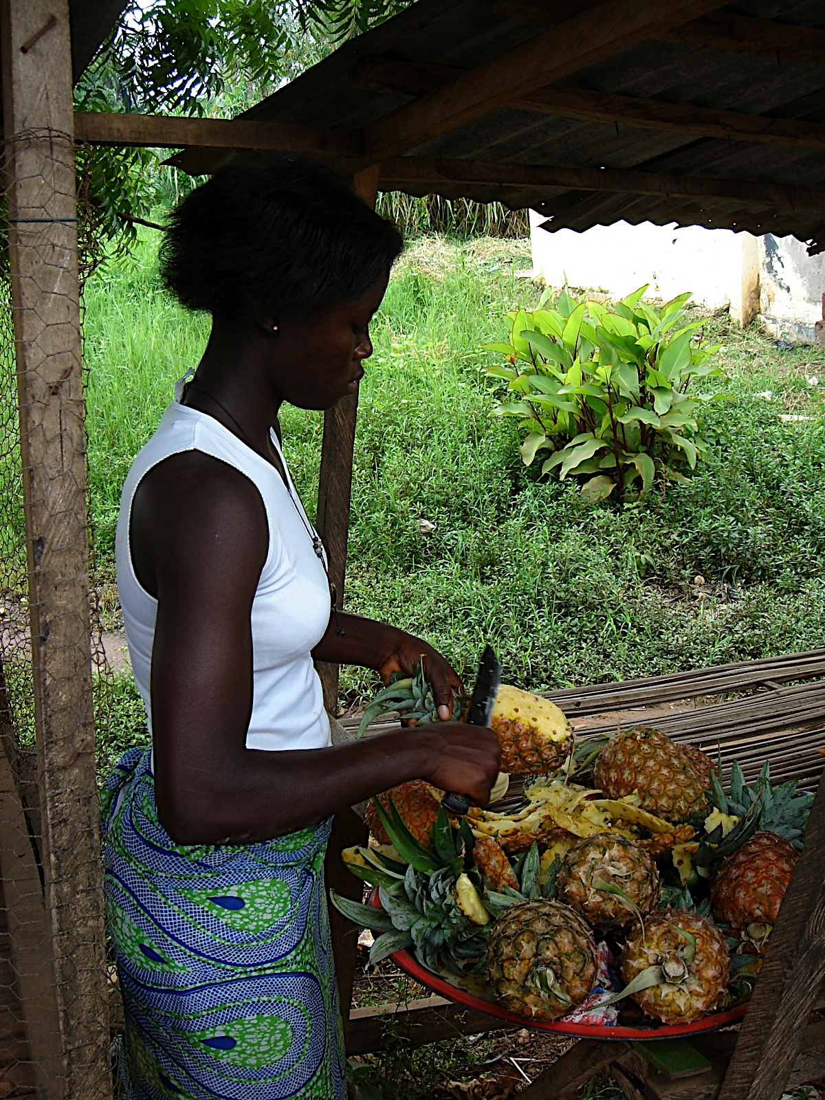 Fruit vendor near Kpalimé, Togo